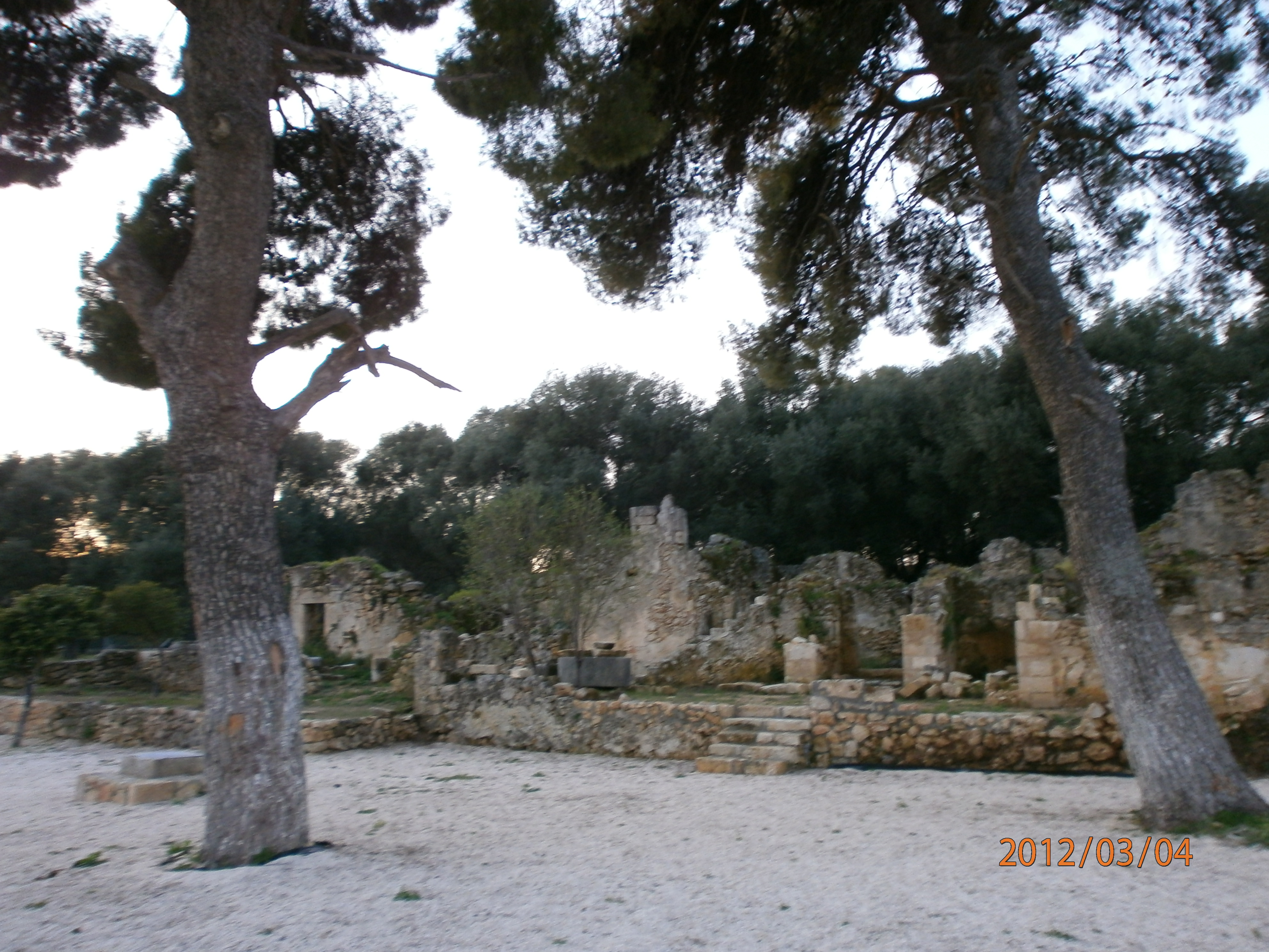 Μερική άποψη του χωριού